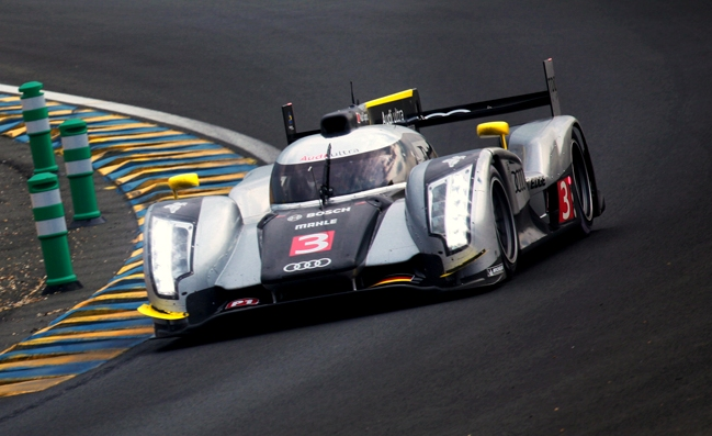 L'Audi R18 TDI à la journée test des 24 Heures du Mans